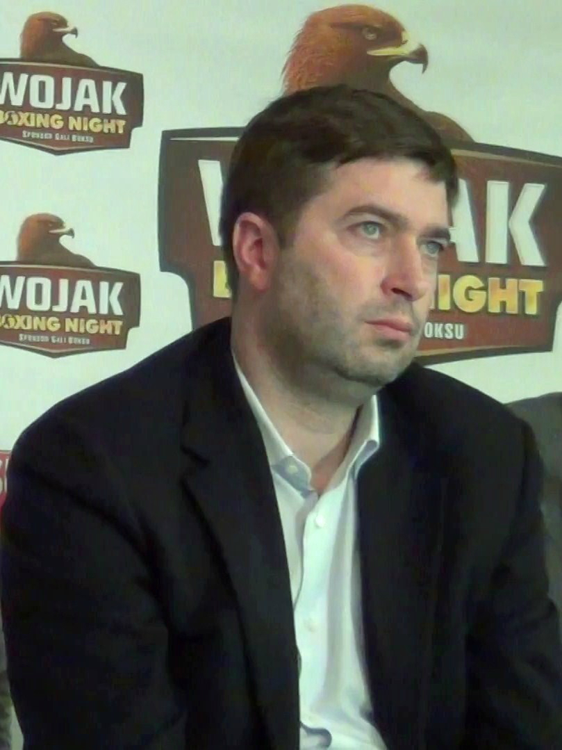 Andrzej Wasilewski, prawnik i promotor bokserski.